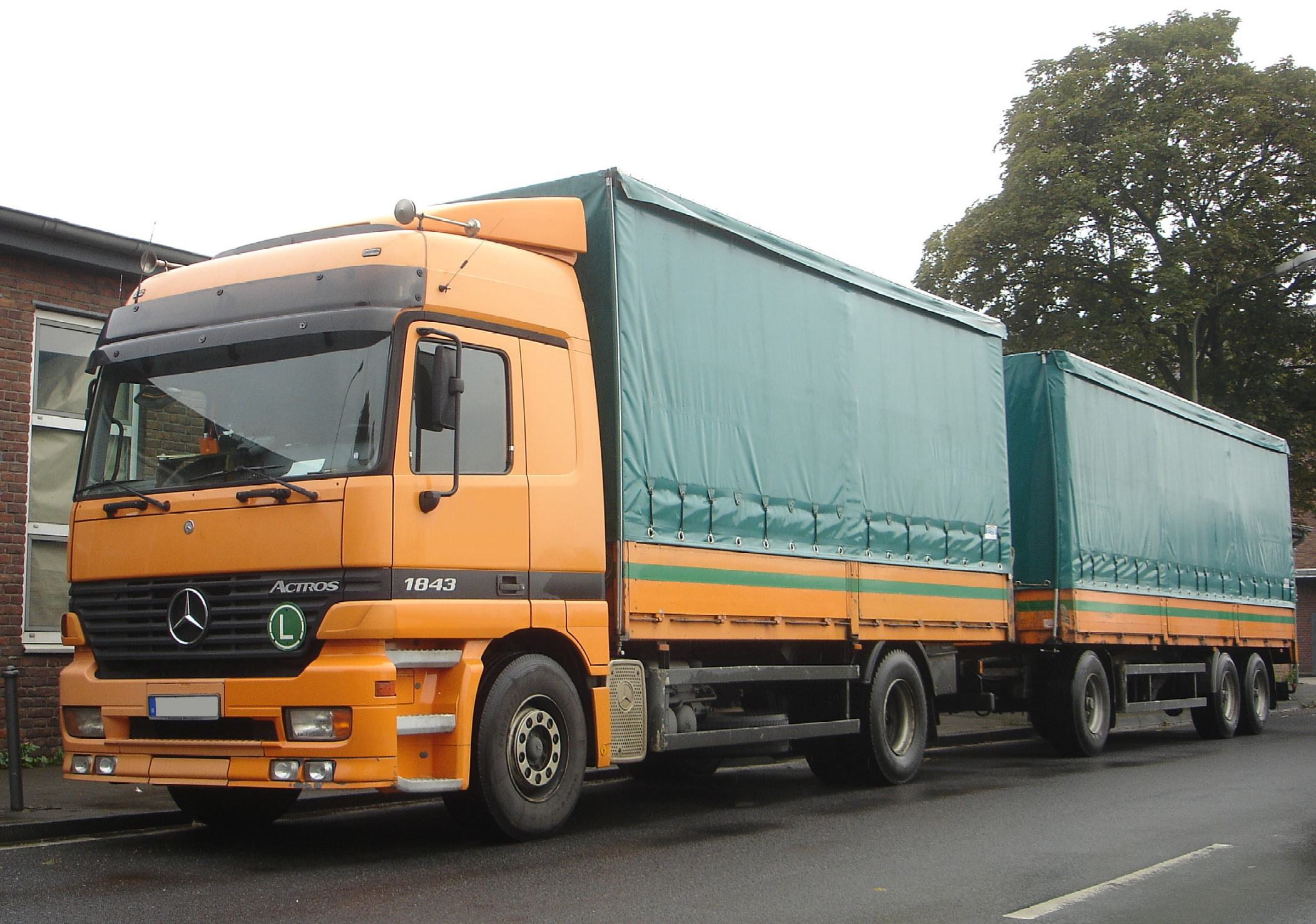 Mercedes-Benz Actros Laster